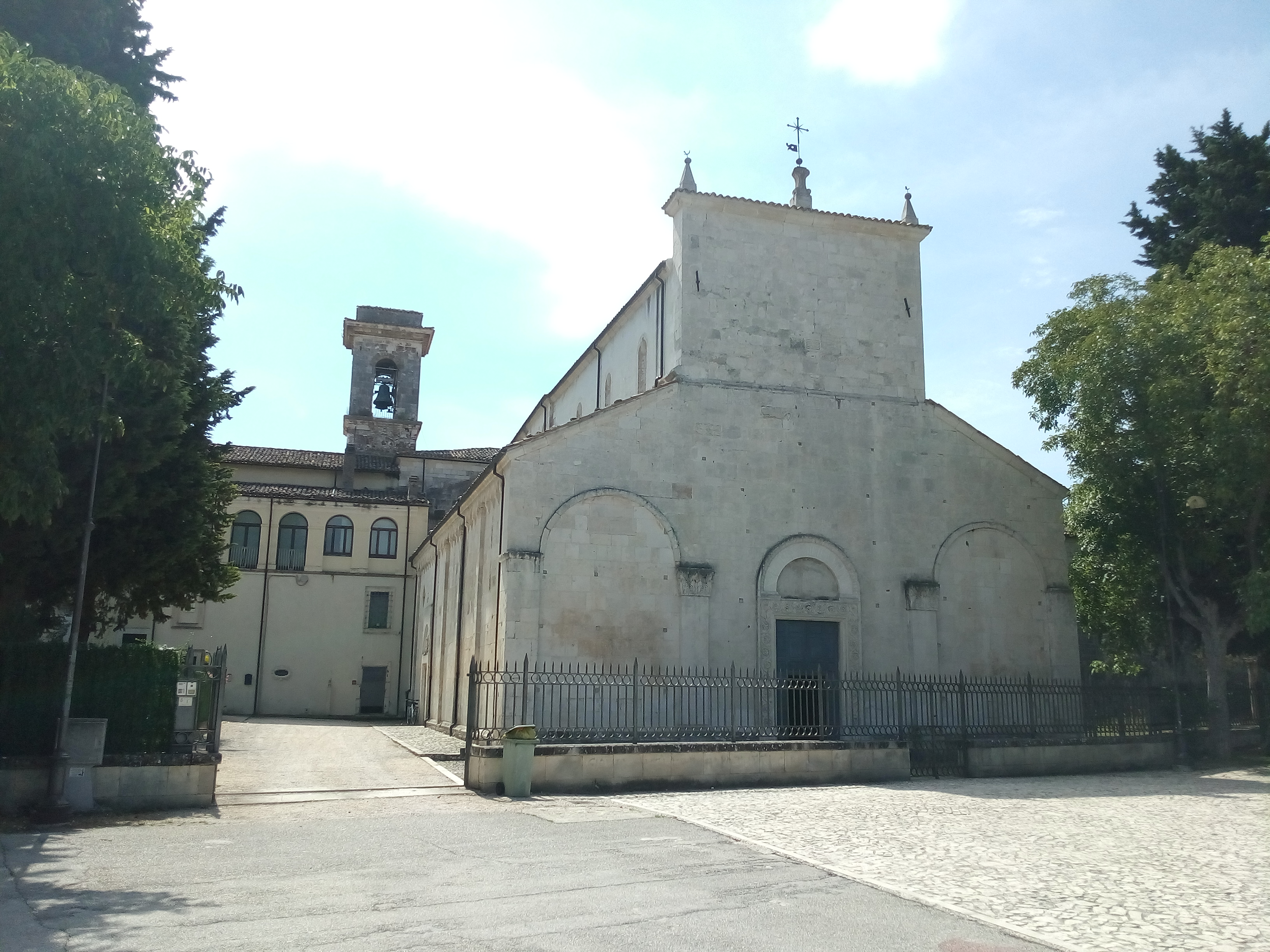 Basilica concattedrale di San Pelino